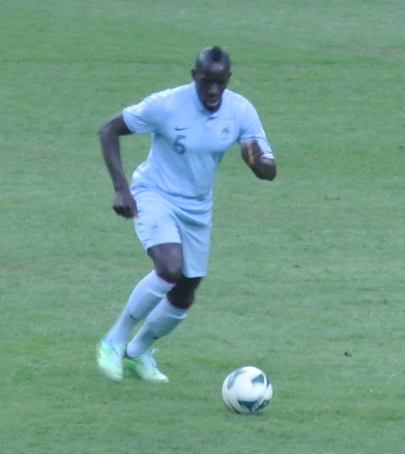 Sakho avec la France face à la Georgie, le 22 mars 2013